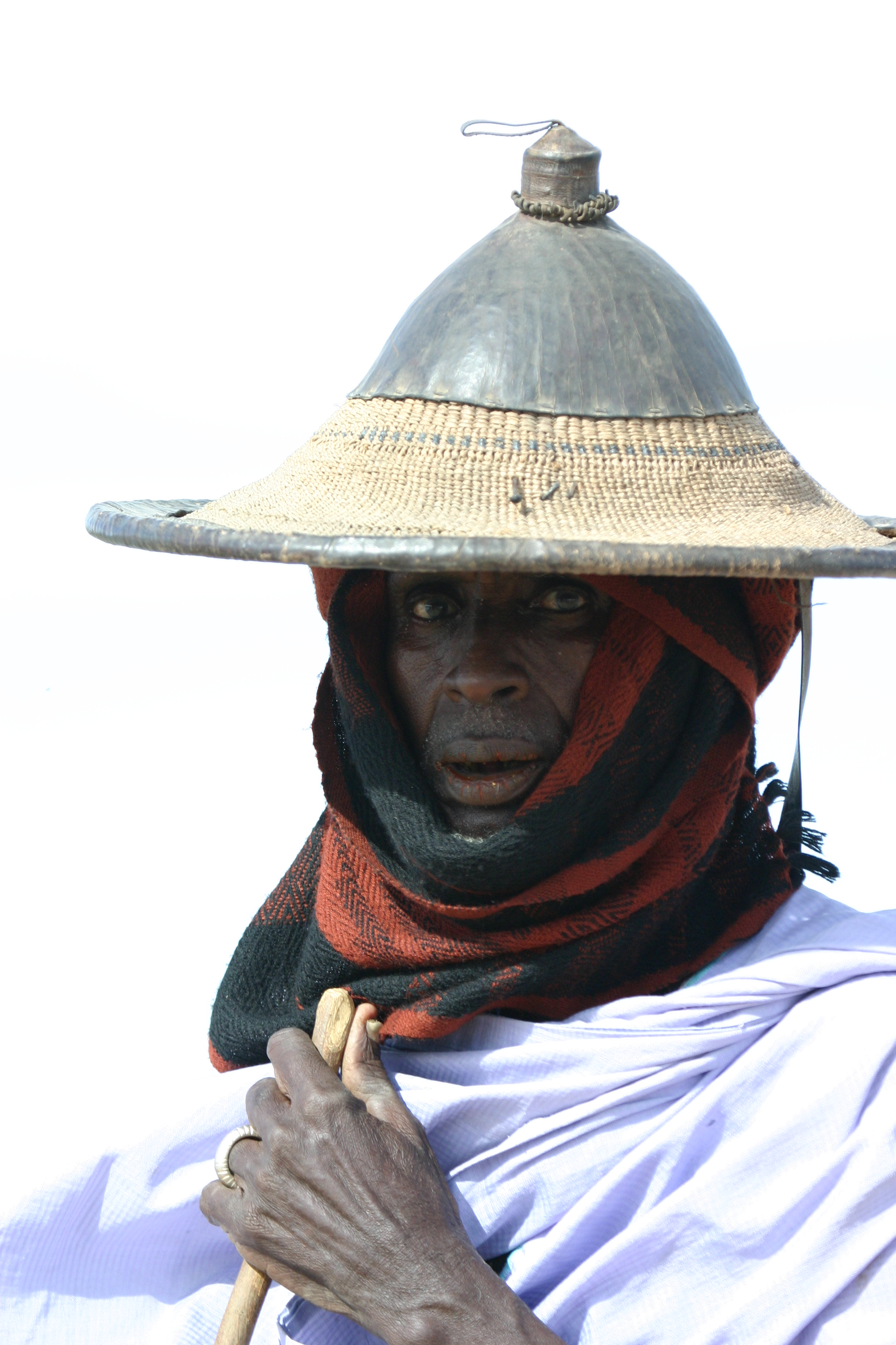 Peul in Mali